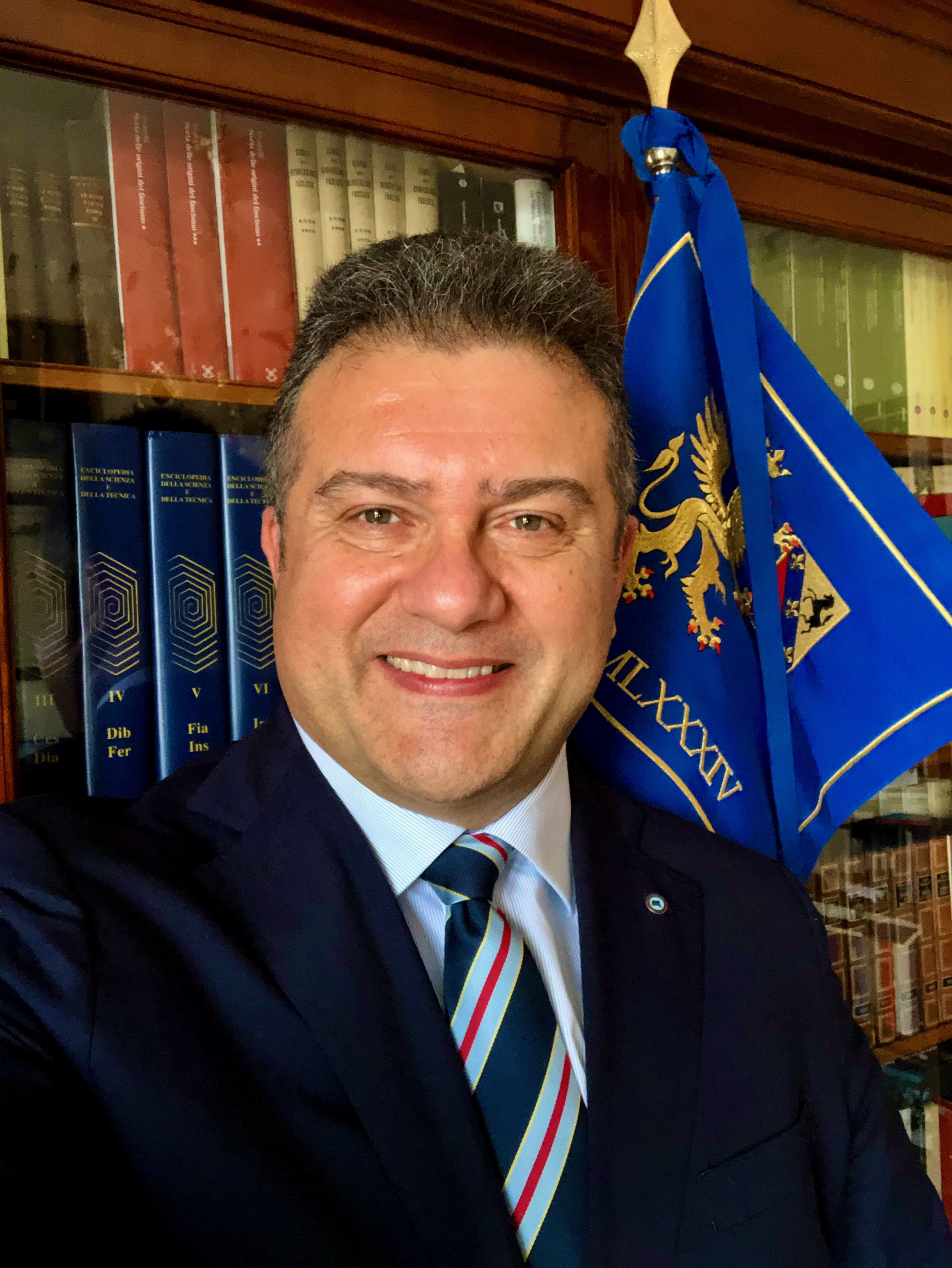 Ferdinando Scala, storico